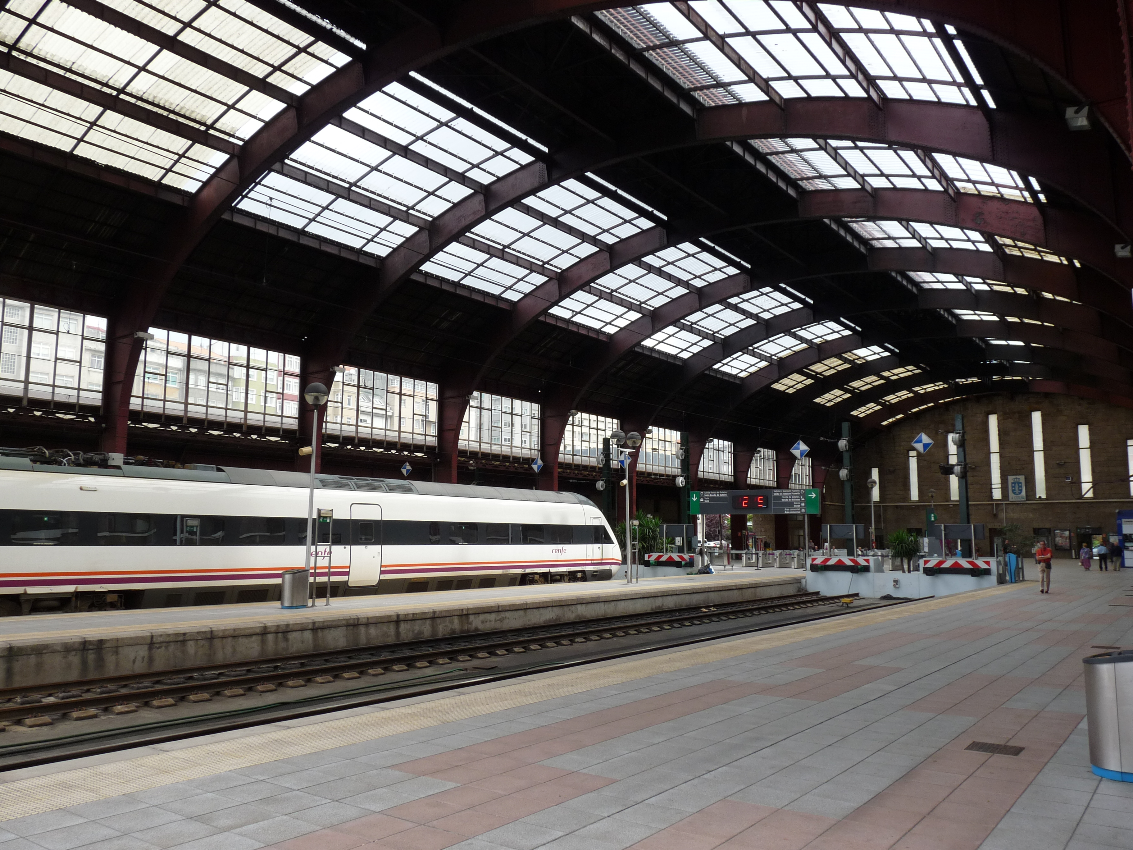 Treinhal van het station